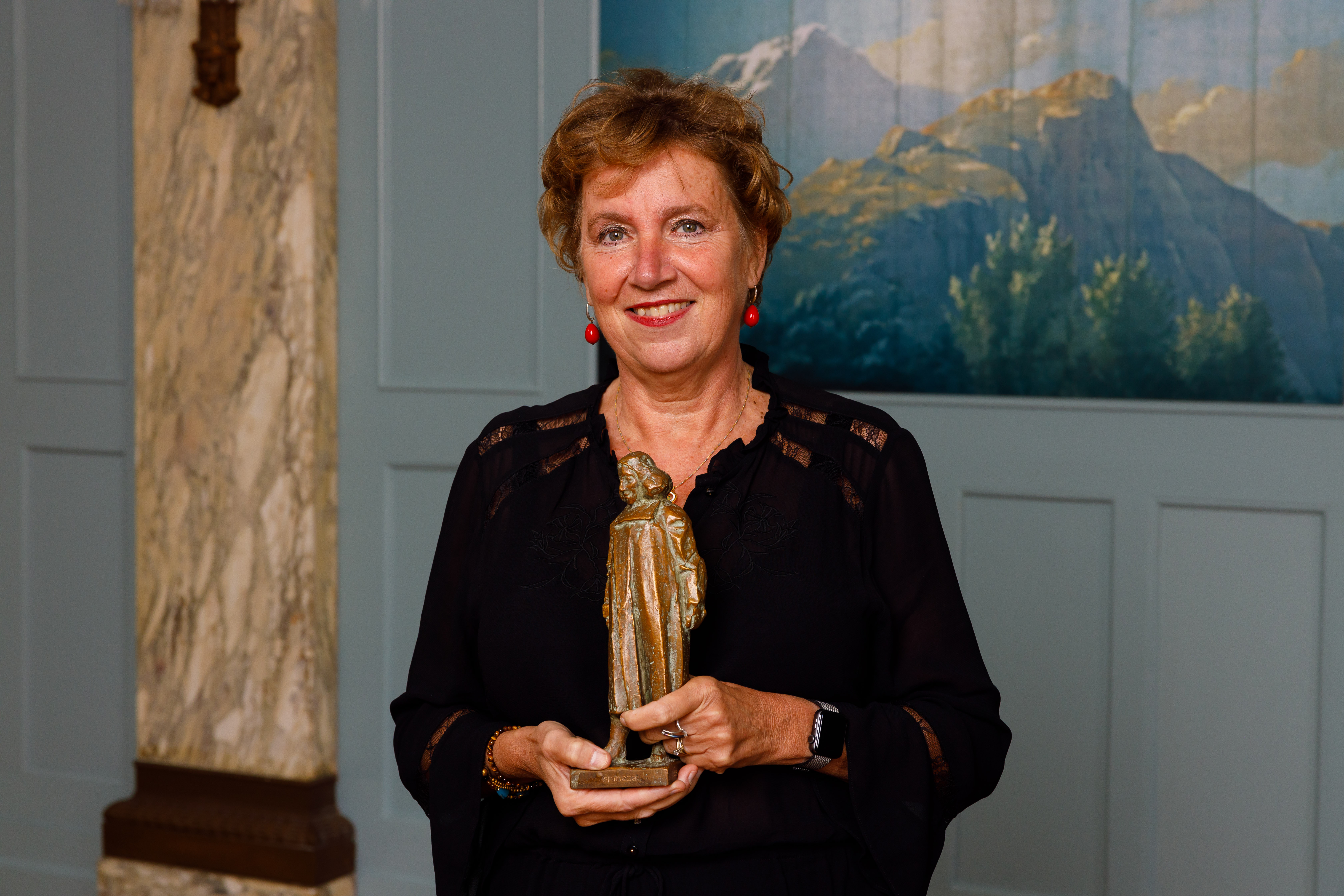 Yvette van Kooyk. Foto: Bram Saeys; NWO. Spinoza- en Stevinpremie, uitreiking 2019